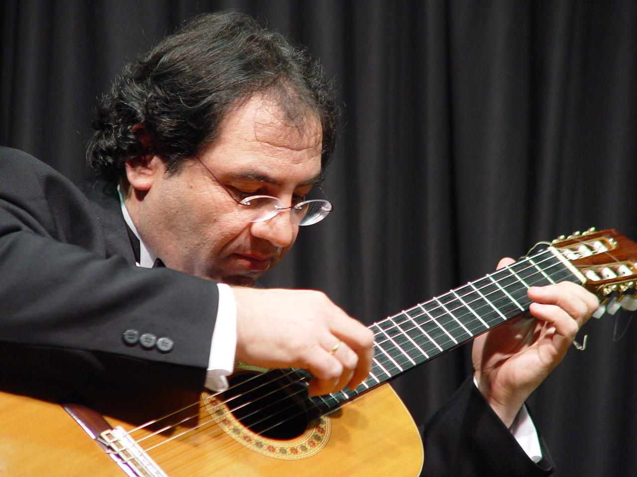 En la imagen se presenta a Salvador Martínez tocando en un concierto clásico de música española.